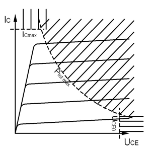 Transistor-Arbeitsbereich mit Begrenzungen